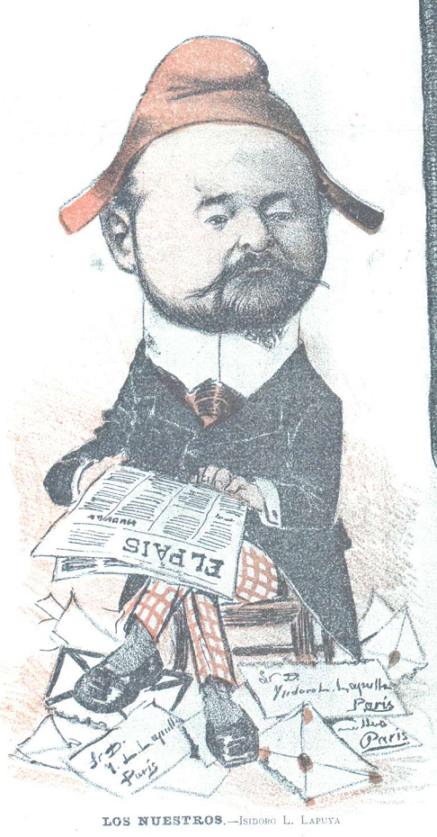 Caricatura.